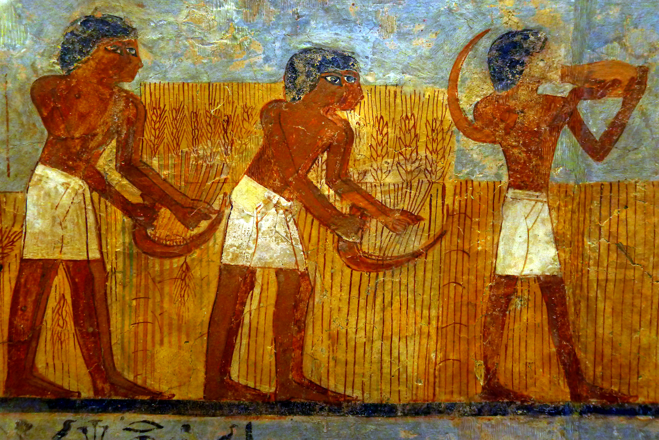 Récolte des épis à la faucille par des moissonneurs.